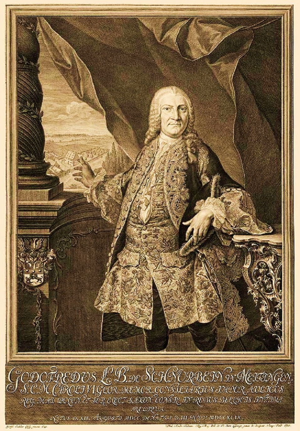 Porträt des Freiherrn Gottfried von Schnurbein zu Meitingen (1741 erbob Kurfürst Friedrich August II. von Sachsen Gottfried von Schnurbein in den Reichsfreiherrnstand.)